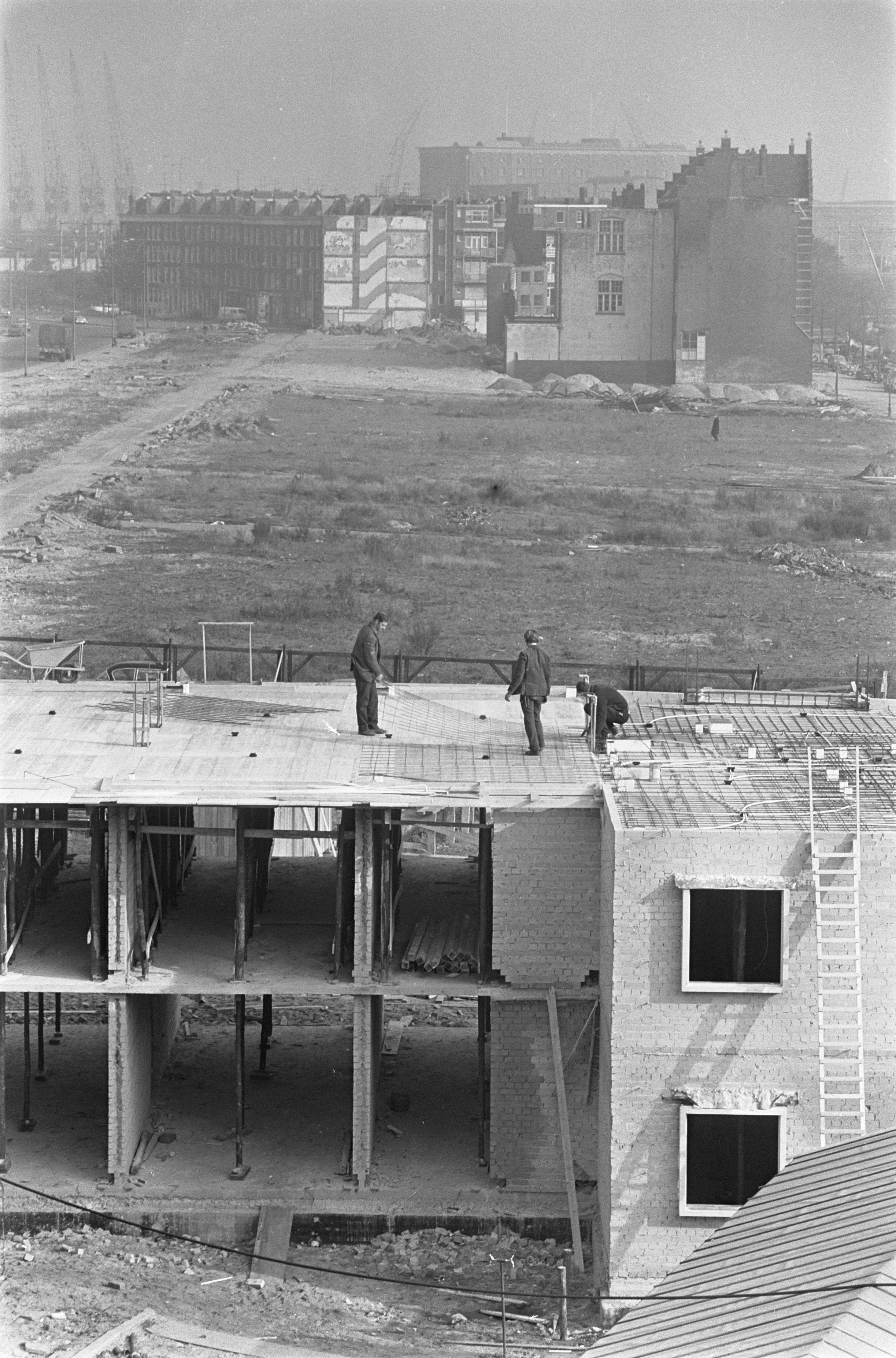 Collectie / Archief : Fotocollectie Anefo Reportage / Serie : [ onbekend ] Beschrijving : Sloop Kattenburg. Datum : 24 oktober 1968 Locatie : Amsterdam Trefwoorden : afbraak Fotograaf : Nijs, Jac. de / Anefo, [onbekend] Auteursrechthebbende : Nationaal Archief Materiaalsoort : Negatief (zwart/wit) Nummer archiefinventaris : bekijk toegang 2.24.01.05 Bestanddeelnummer : 921-7930